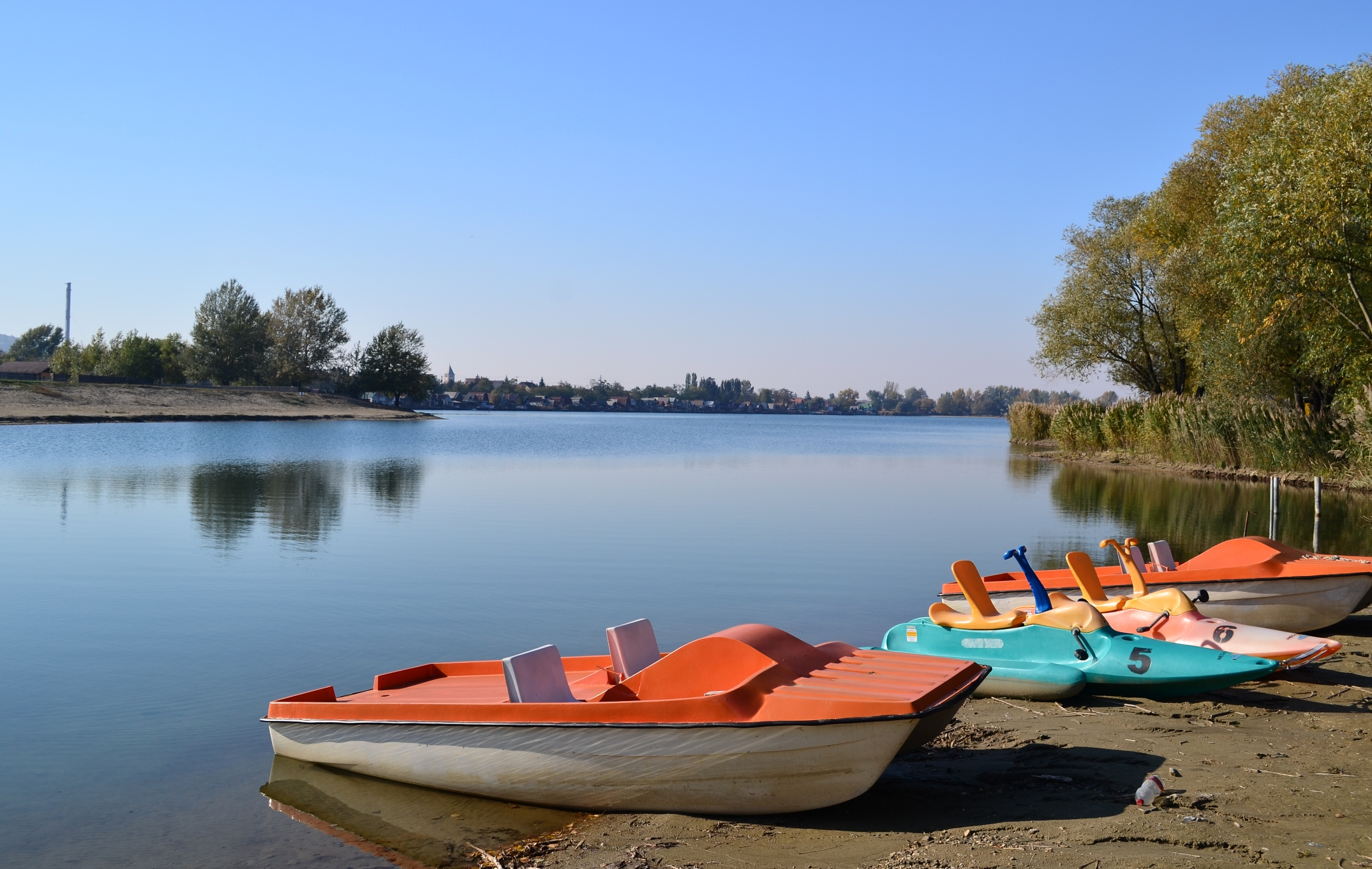 A Palatinusz-tó a keleti oldali öbölből fotózva.